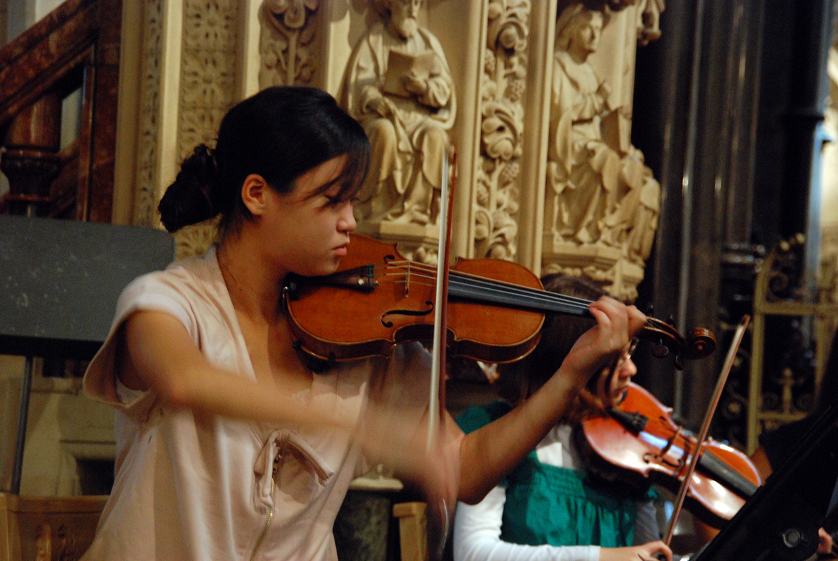 Chica tocando el violín